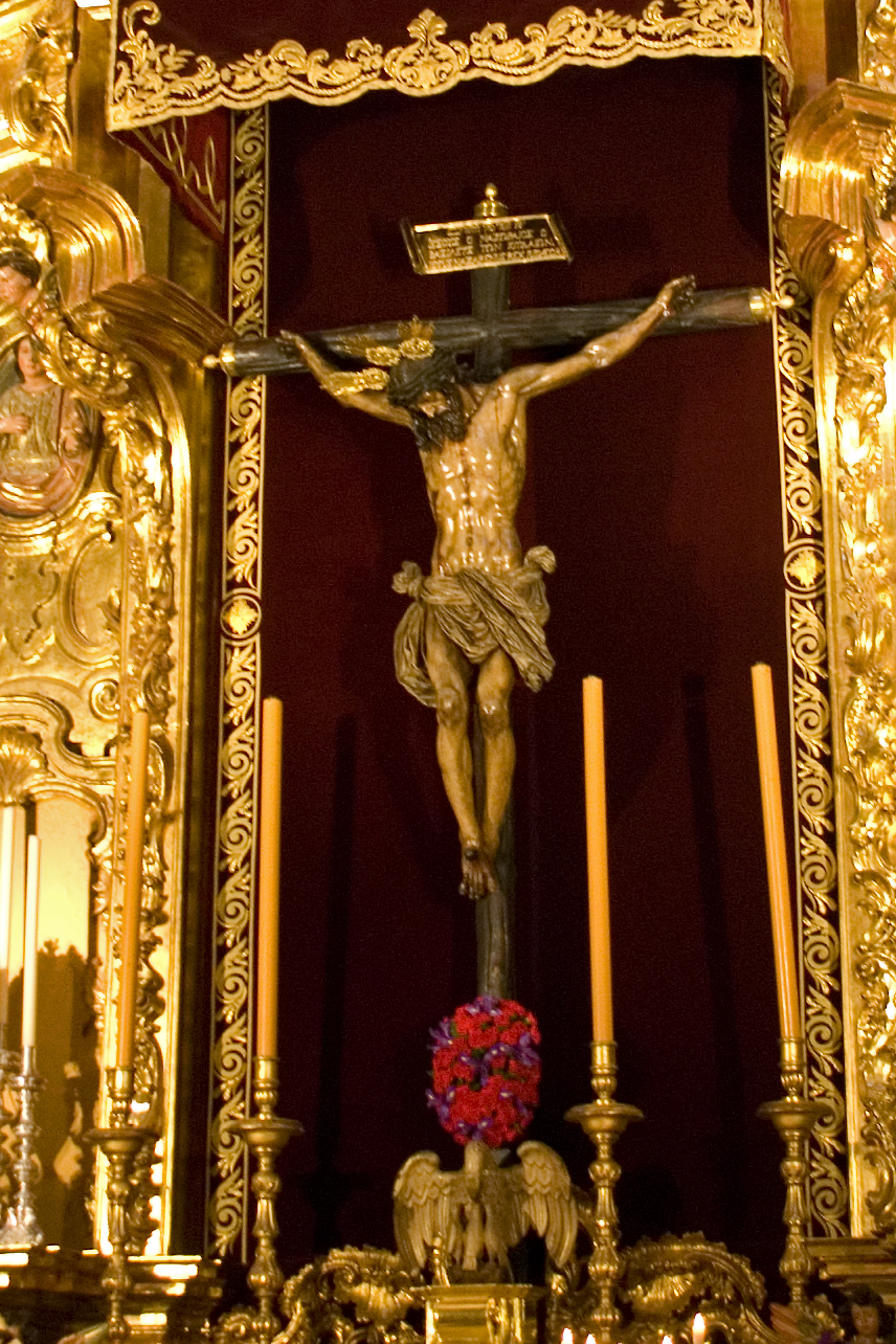 Cristo del Amor, (1618-1620), autor: Juan de Mesa. Iglesia del Salvador de Sevilla